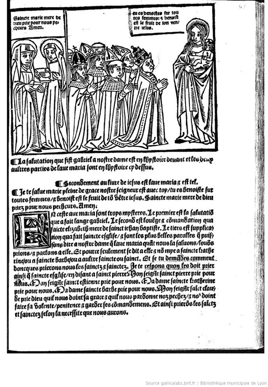 Grant Kalendrier des Bergers - 1508 - Claude Nourry - Ave Maria